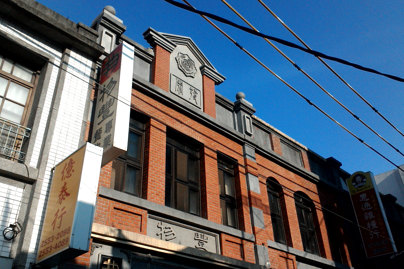 物豐商行,台北市大同區延平次分區大有里